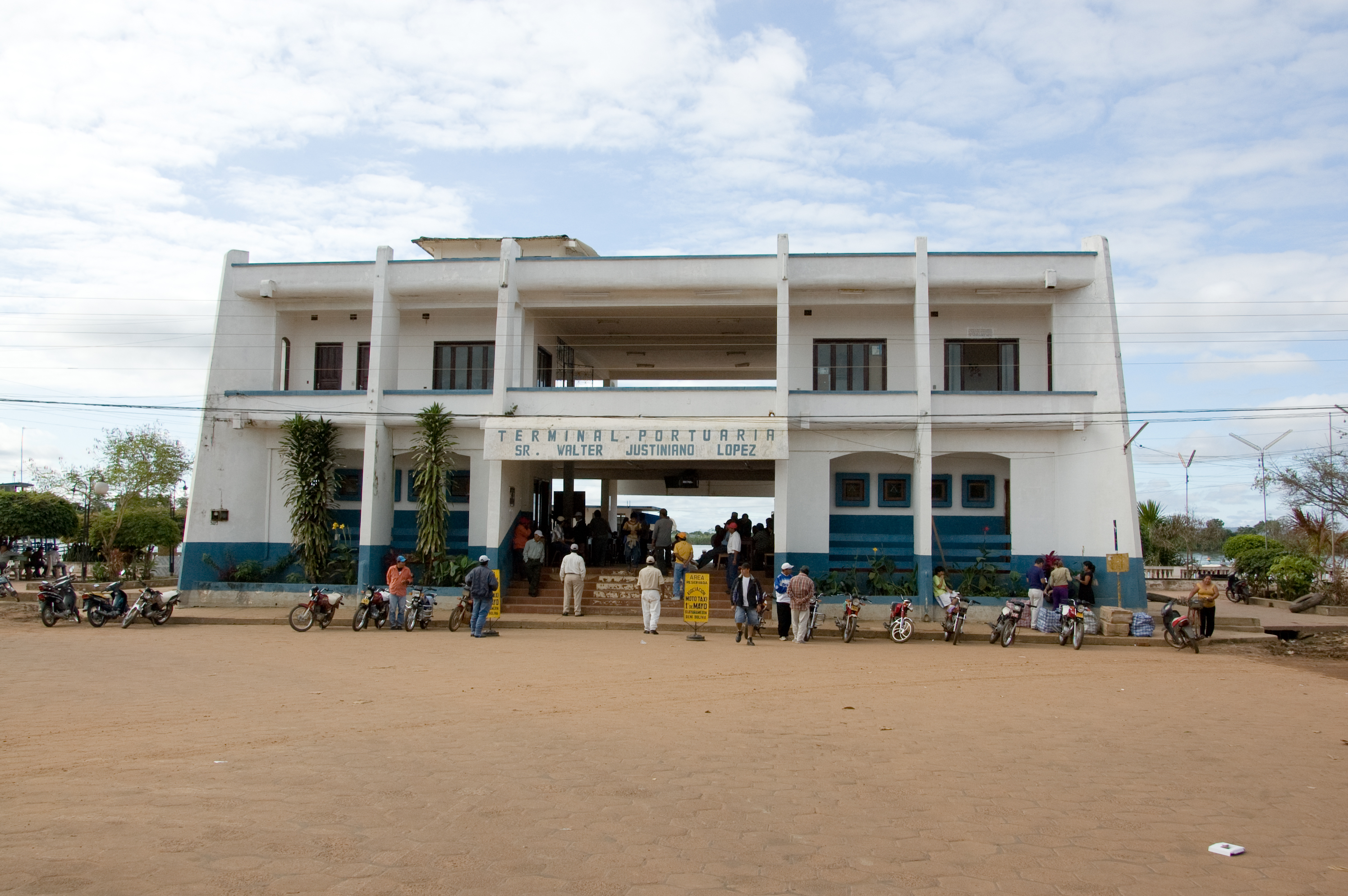 Guayaramerín, Beni, Bolivien. Passagierhafen für die Überquerung nach Guajará-Mirim, Rondônia, Brasilien